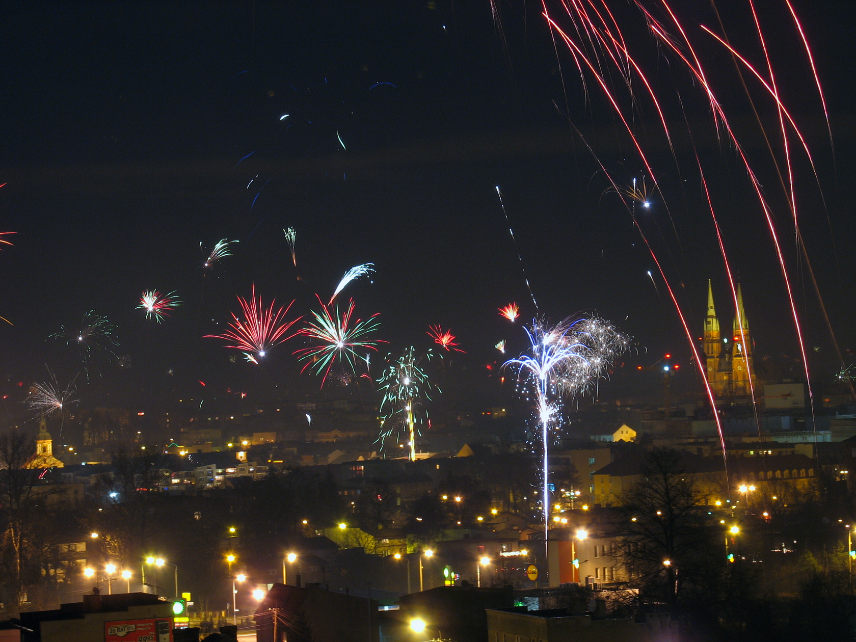 Novoroční oslavy 2007 v Rybniku, ohňostroj nad městem